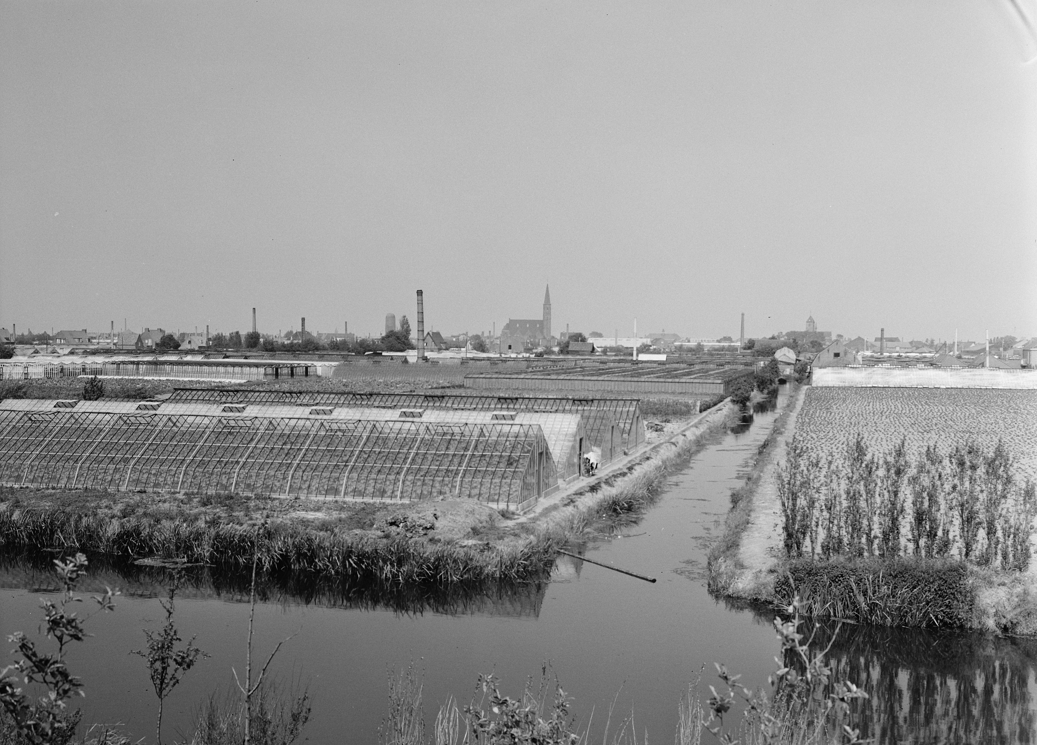 Collectie / Archief : Fotocollectie Nederlandse Heidemaatschappij Reportage / Serie : [ onbekend ] Beschrijving : karakteristieke landschappen, kassen, drainage Datum : juli 1958 Locatie : Naaldwijk Trefwoorden : drainage, karakteristieke landschappen, kassen Fotograaf : [onbekend] Auteursrechthebbende : Nationaal Archief Materiaalsoort : Negatief (zwart/wit) Nummer archiefinventaris : bekijk toegang 2.24.06.02 Bestanddeelnummer : 164-0223